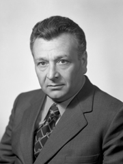 Franco Salerno, Senatore della Repubblica e presidente del Matera per 25 anni